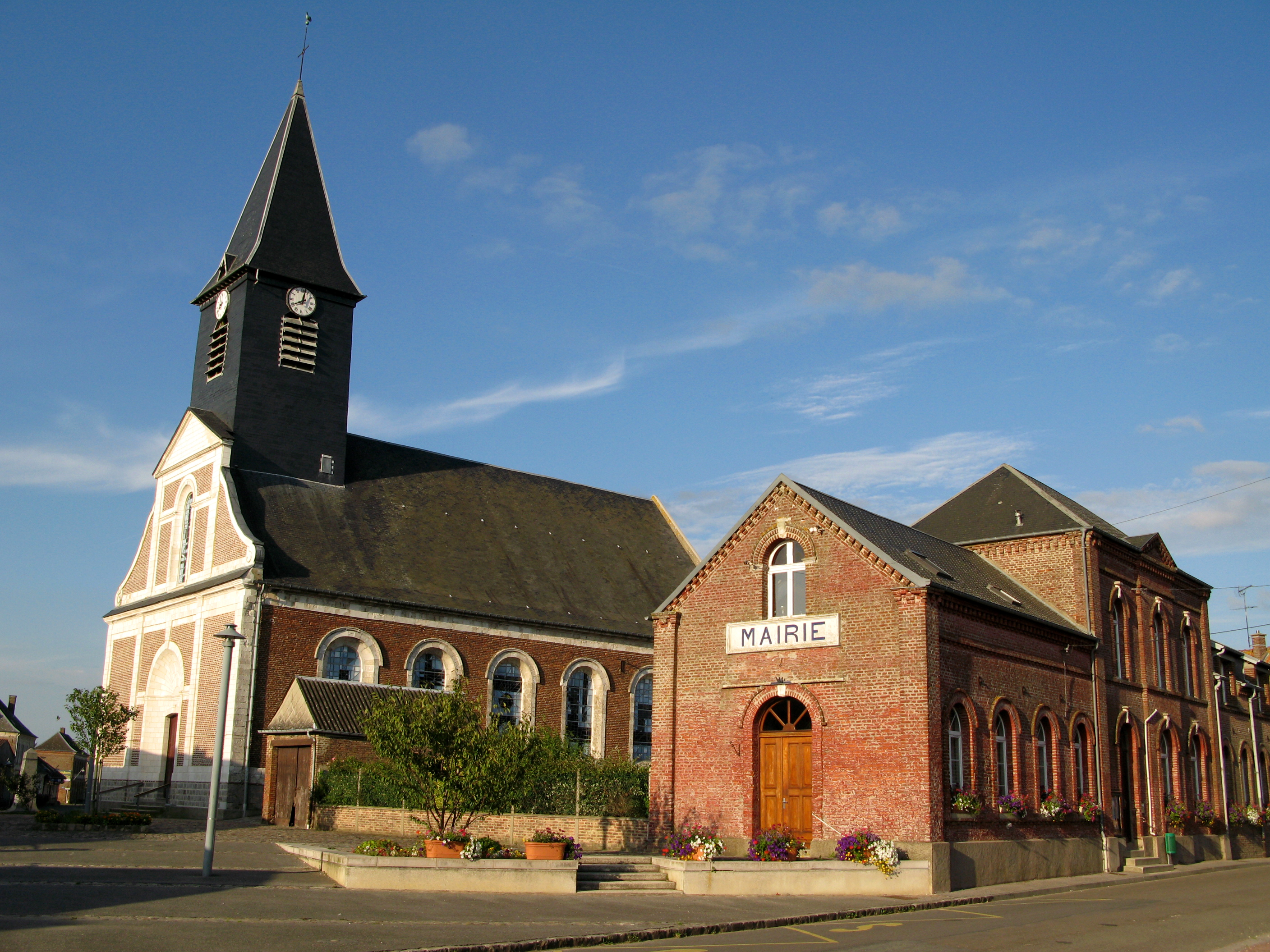 Candas (Somme, France) - L'église et la mairie.